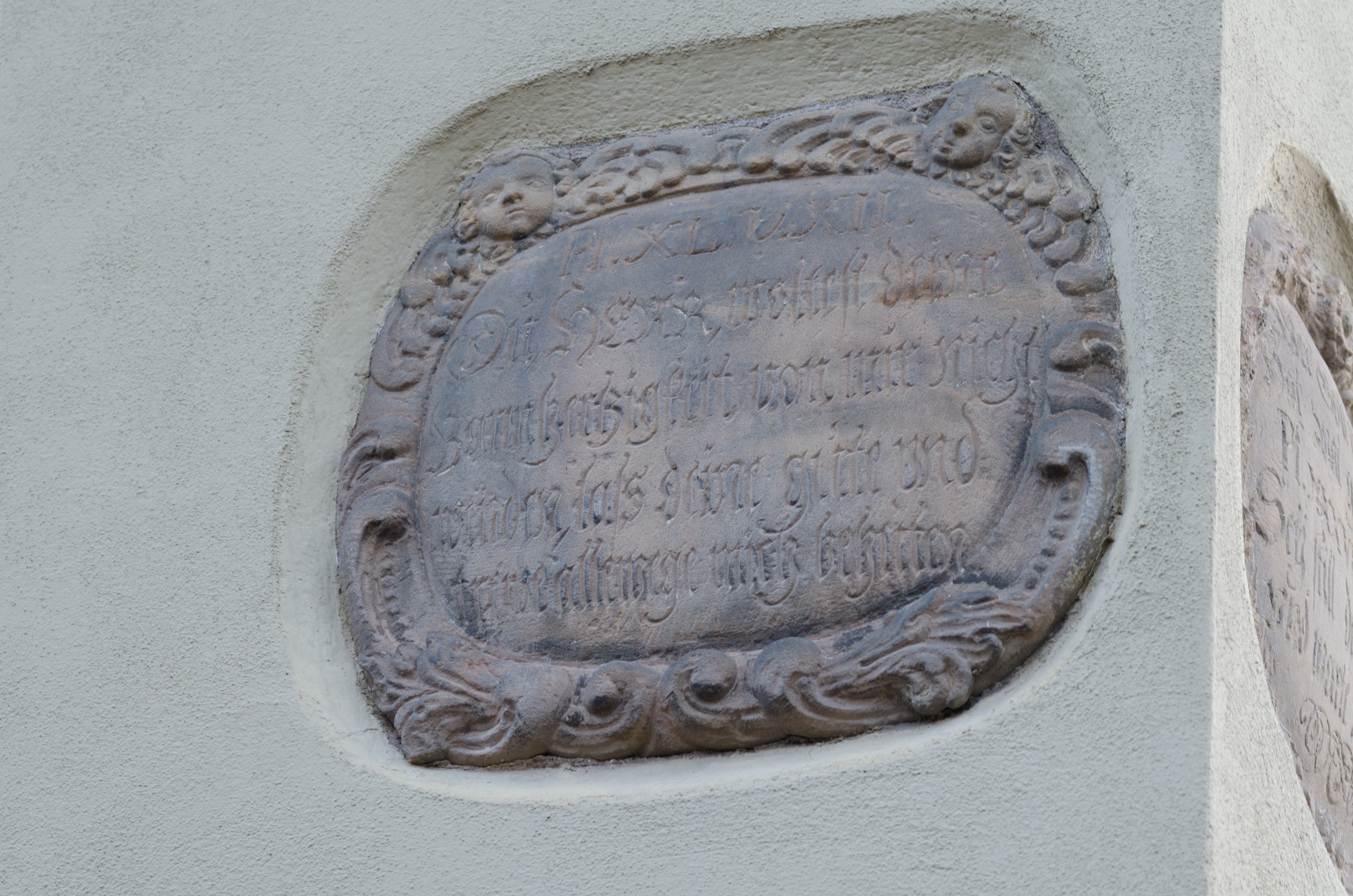 Gotha, Querstraße 21. Psalm 40 Vers 12.